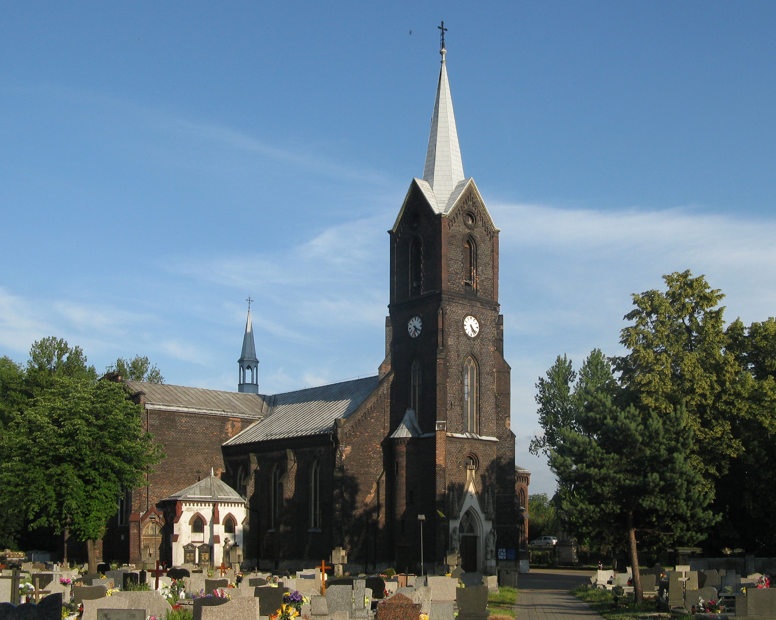 Kościół pw. św. Augustyna w Świętochłowicach-Lipinach, ul. Antoniego Bukowego 22.